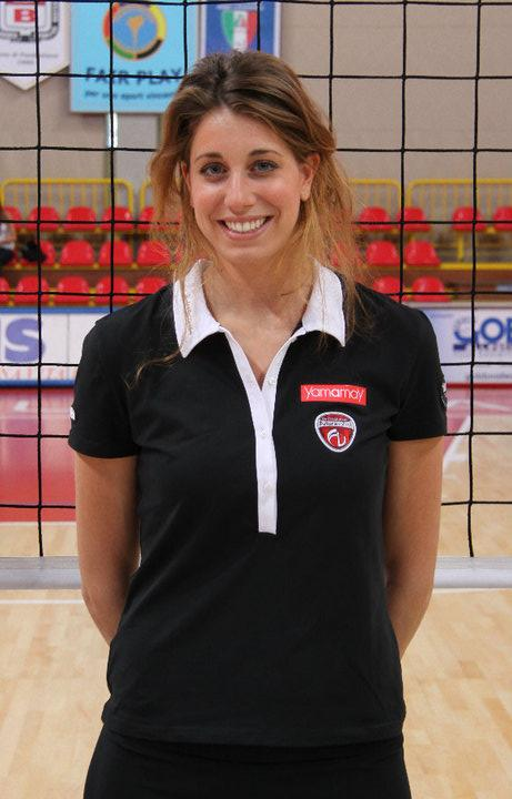 Floortje Meijners, pallavolista neerlandese, gioca nel ruolo di schiacciatrice